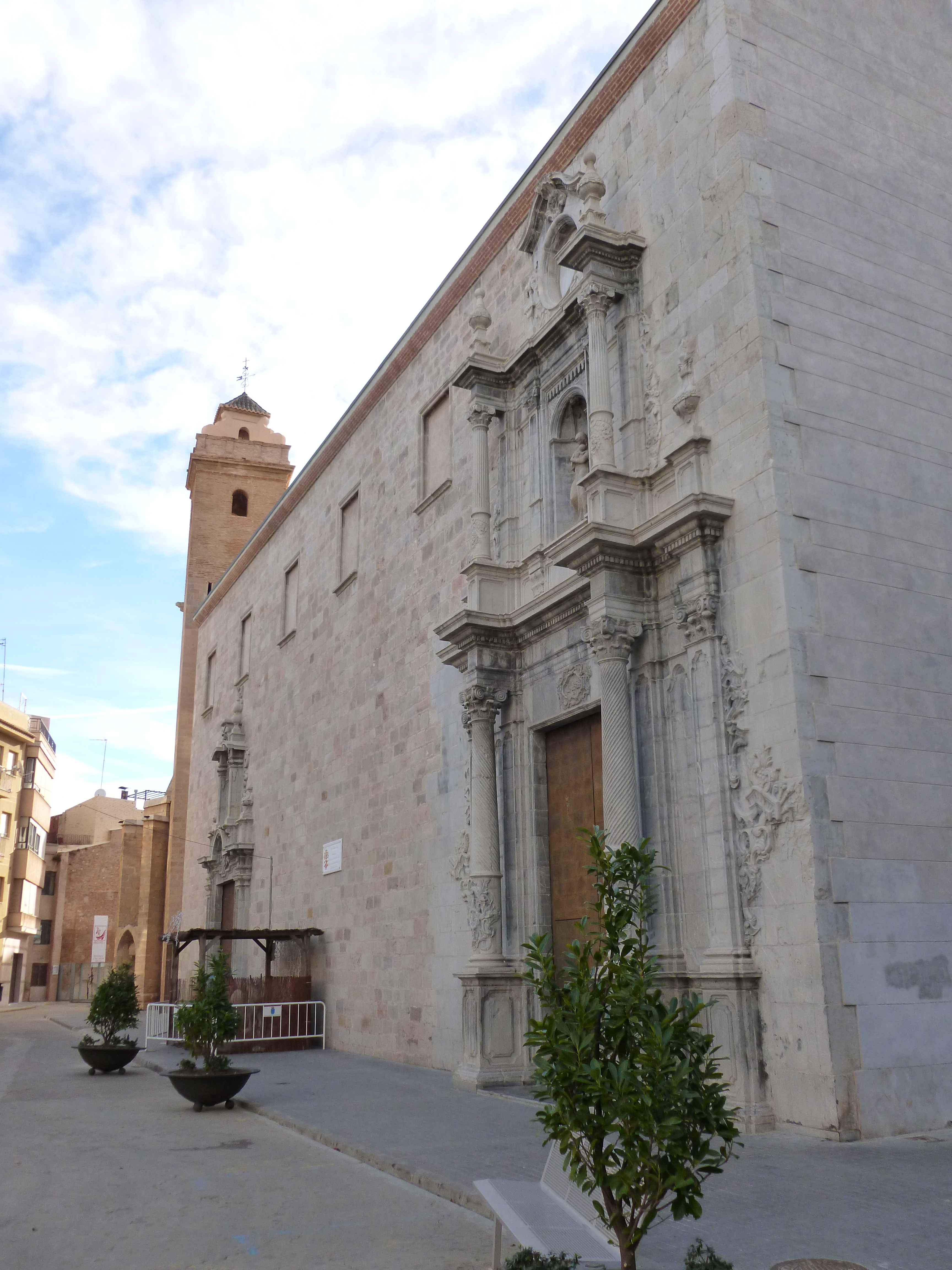 Església del Salvador de Borriana